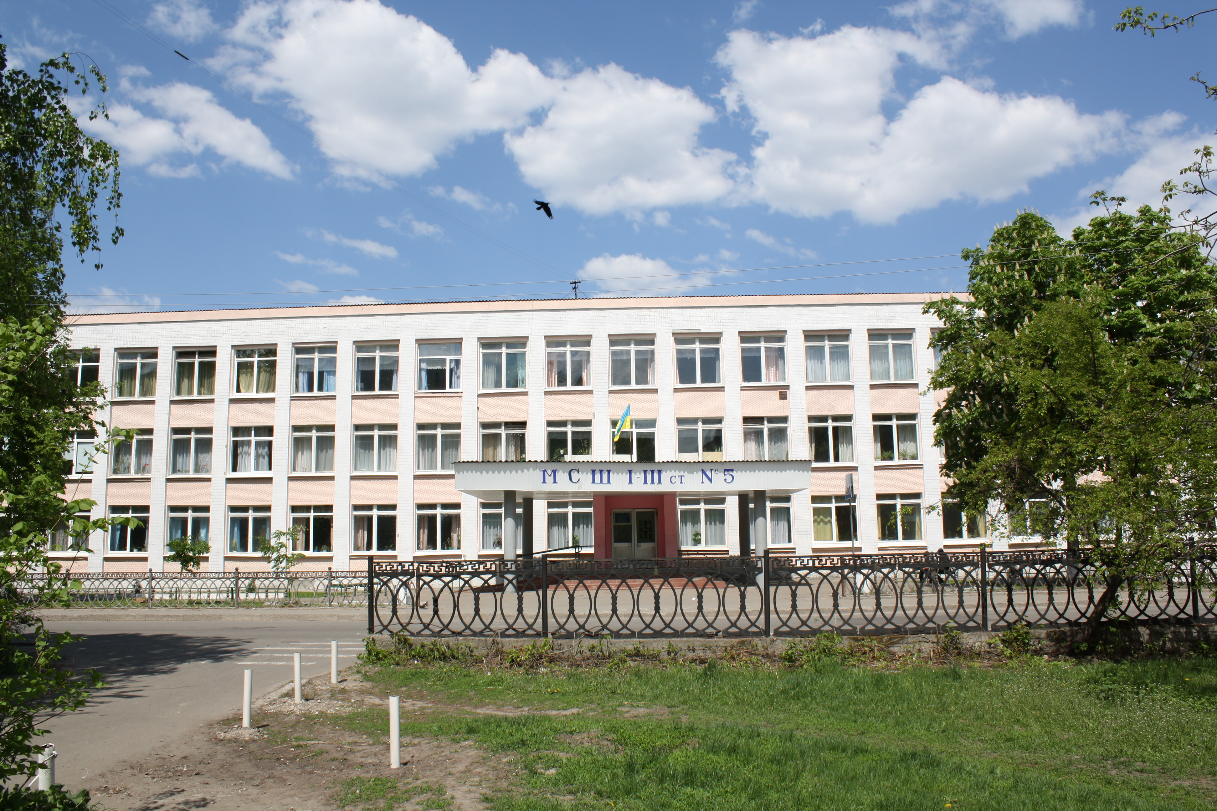 Миргородська спеціалізована загальноосвітня школа № 5